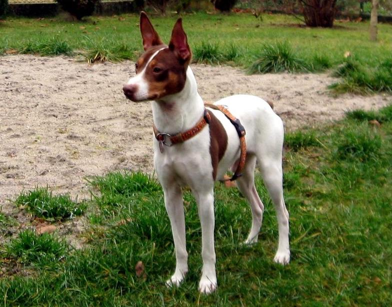 male Ratonero Valenciano (dog breed)